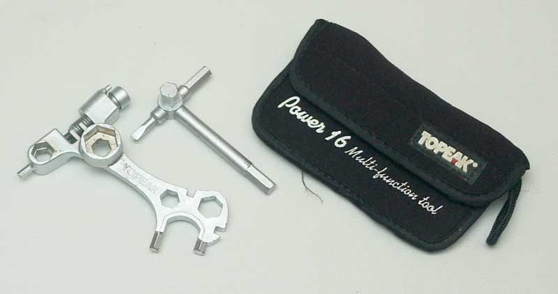 Multi-1-g